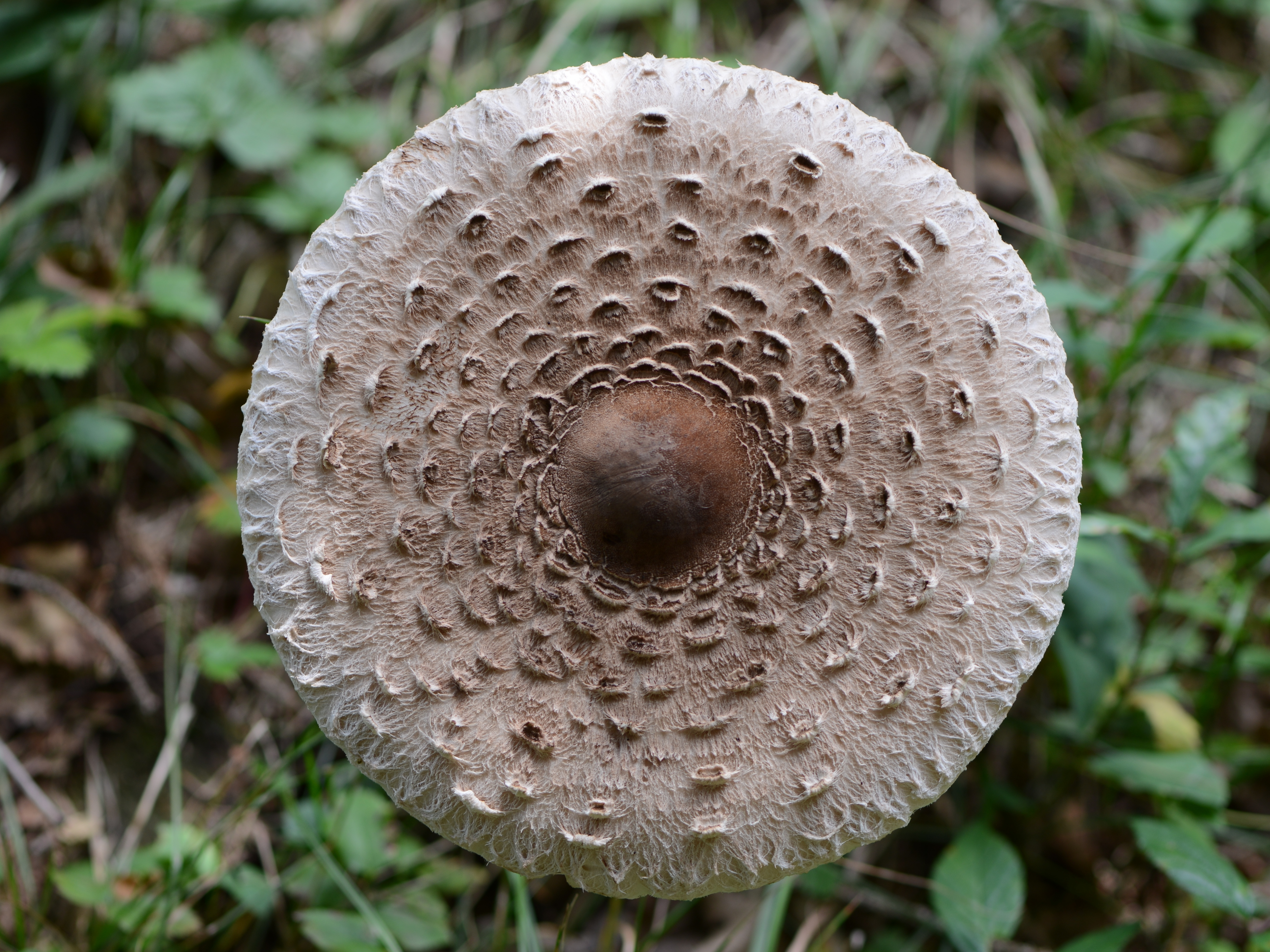 Der Parasol (Macrolepiota procera), oder Riesenschirmpilz in seiner natürlichen Umgebung. Gefunden ob Wolfurt in der Parzelle Bereuter.